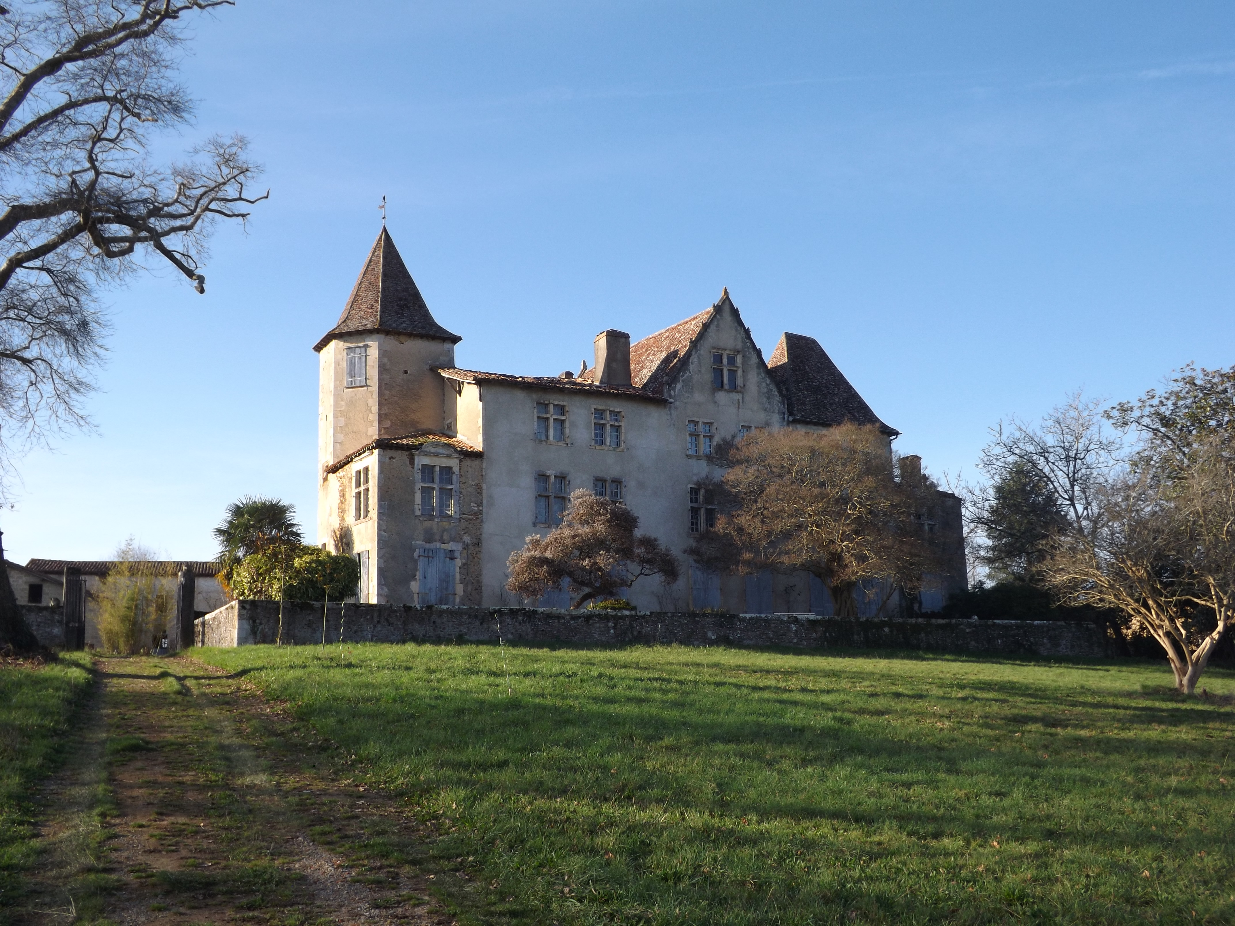 Castèth de Lataulada ; St-Cric de Shalòssa, Gasconha